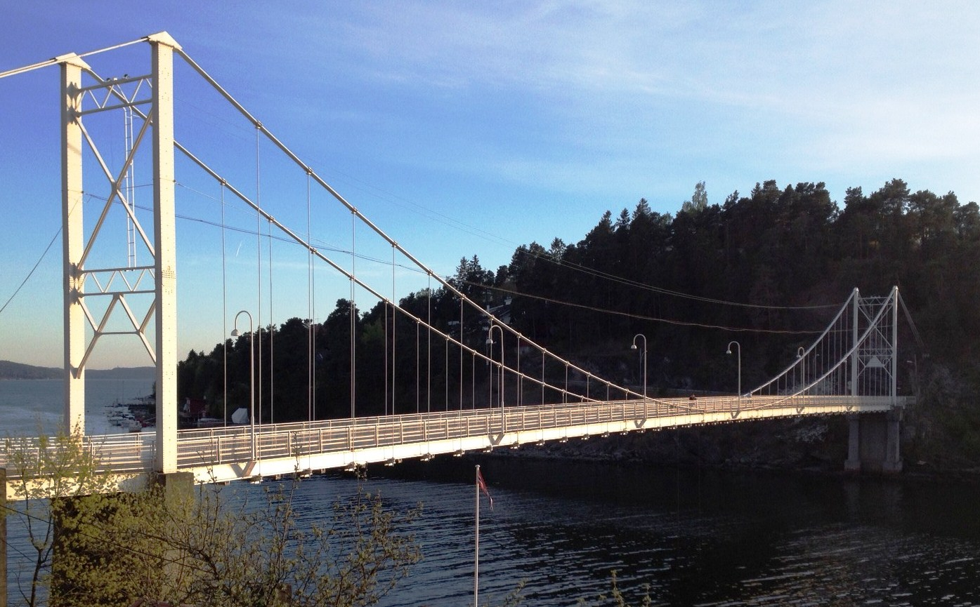 Ulvøybrua, Oslo